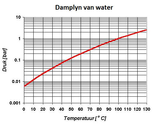 Logaritmiese weergawe van die verhouding tussen dampdruk en kookpunt van water.